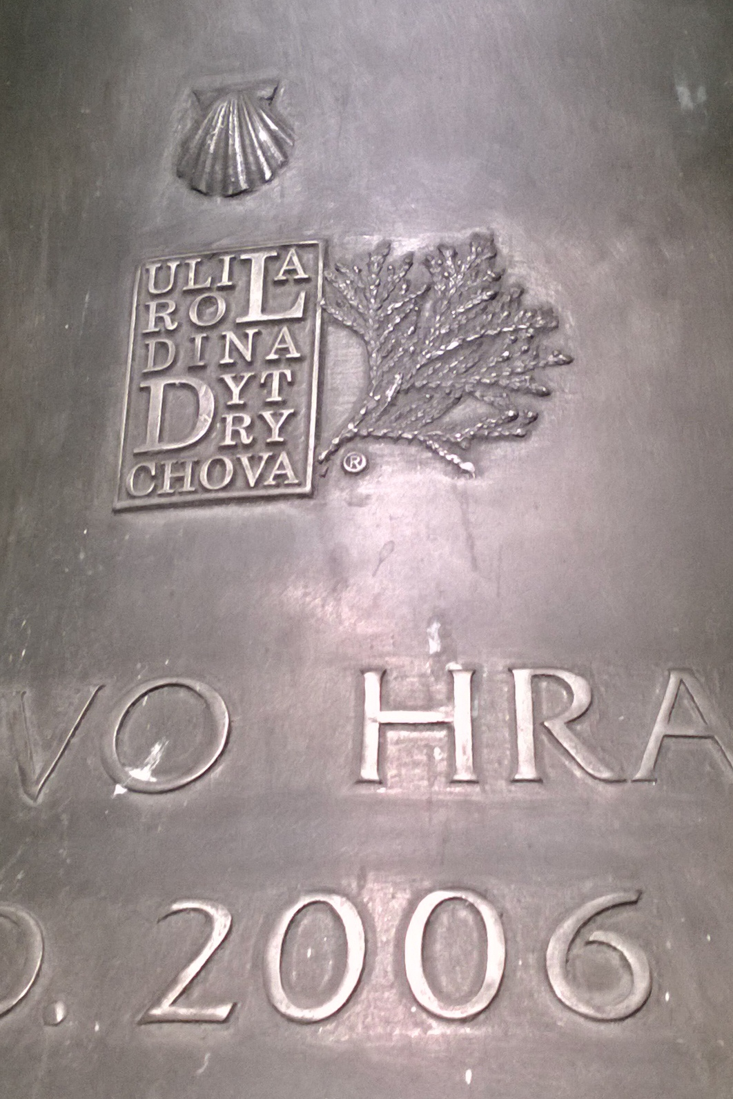 Zvon sv. Jakub v kostele sv. Jakuba. Ulit ve zvonařství Dytrychová roku 2006.